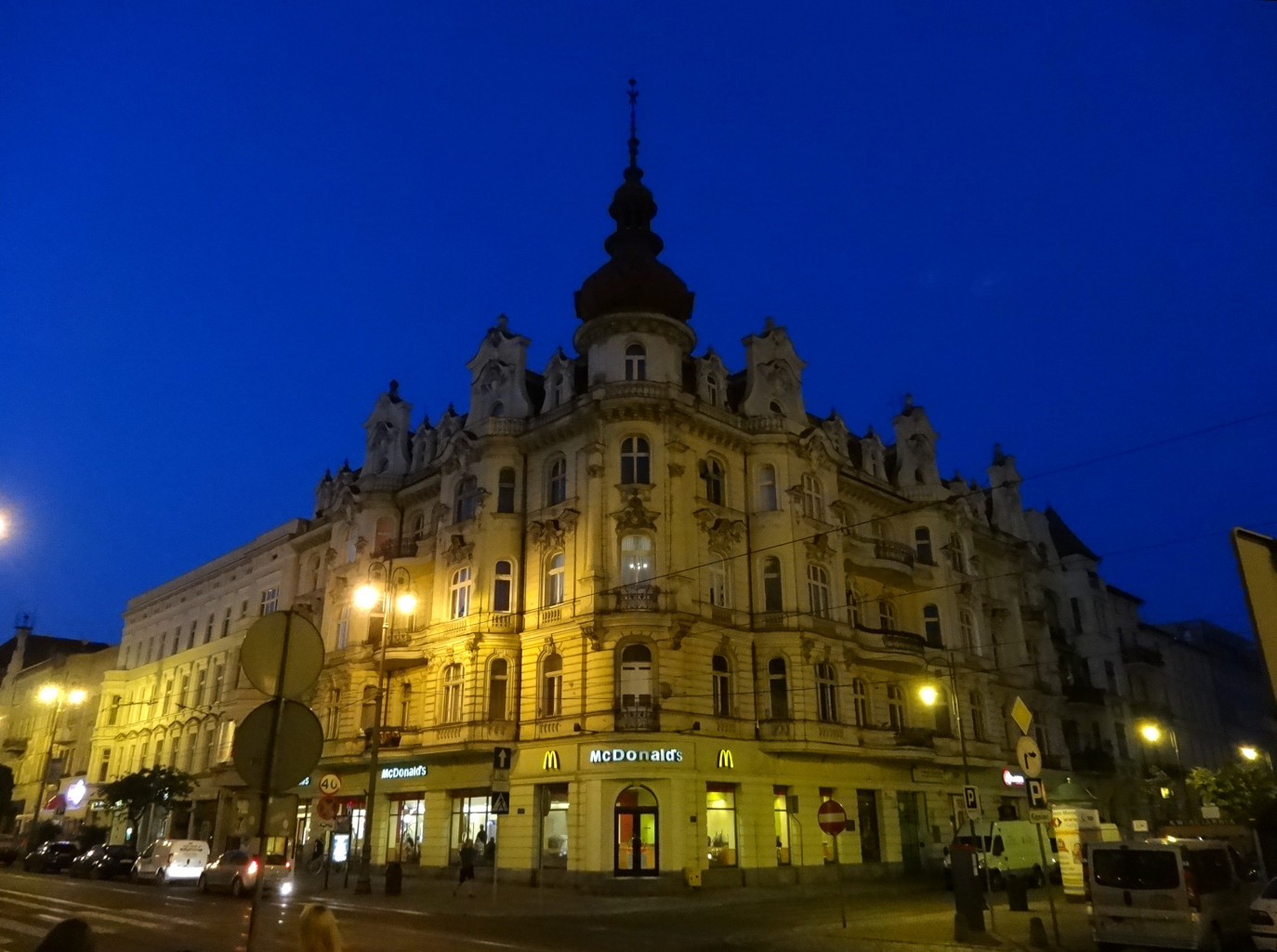 Kamienica Plac Wolności 1 w Bydgoszczy, róg ul. Gdańskiej (1898, aut. Józef Święcicki)